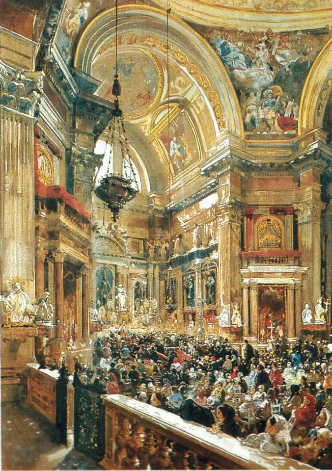 Giacinto Gigante _ La Cappella di San Gennaro nel Duomo di Napoli (probabilmente nel giorno di San Gennaro).